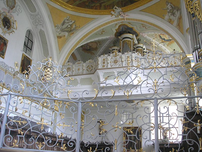 Kloster Oberschönenfeld bei Augsburg (Bayerisch-Schwaben). Blick in den Nonnenchor der Kirche. Eigene Aufnahme, Sept. 2006 / Oberschoenenfeld Monastery near Augsburg (Bavaria, Germany). Abbey church. View into the choir of the nuns. Own photo, Sept. 2006